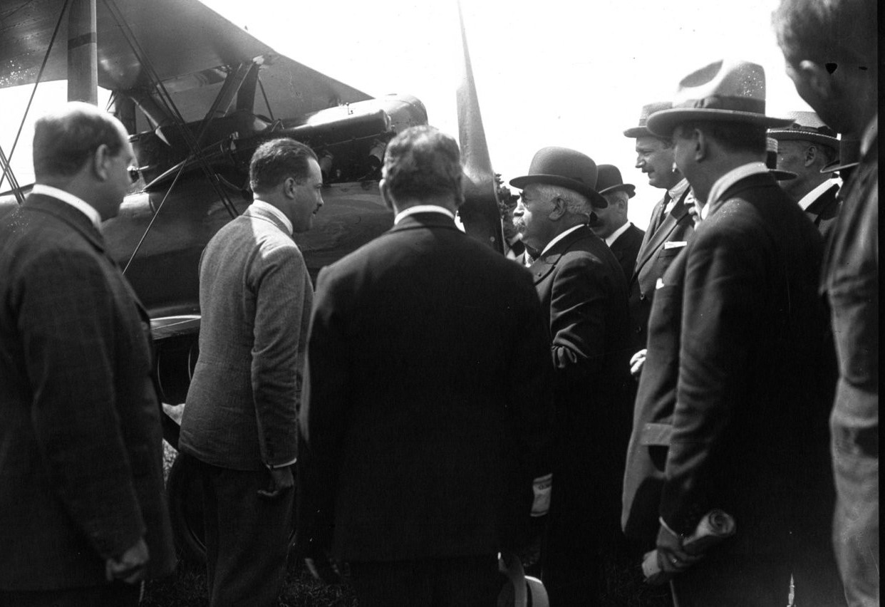 Le président Alexandre Millerand félicitant l'aviateur Joseph Sadi-Lecointe lors des « Vieilles Tiges », au Bourget.